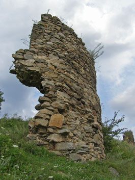 Губківський замок 1.jpg: Губківський замок